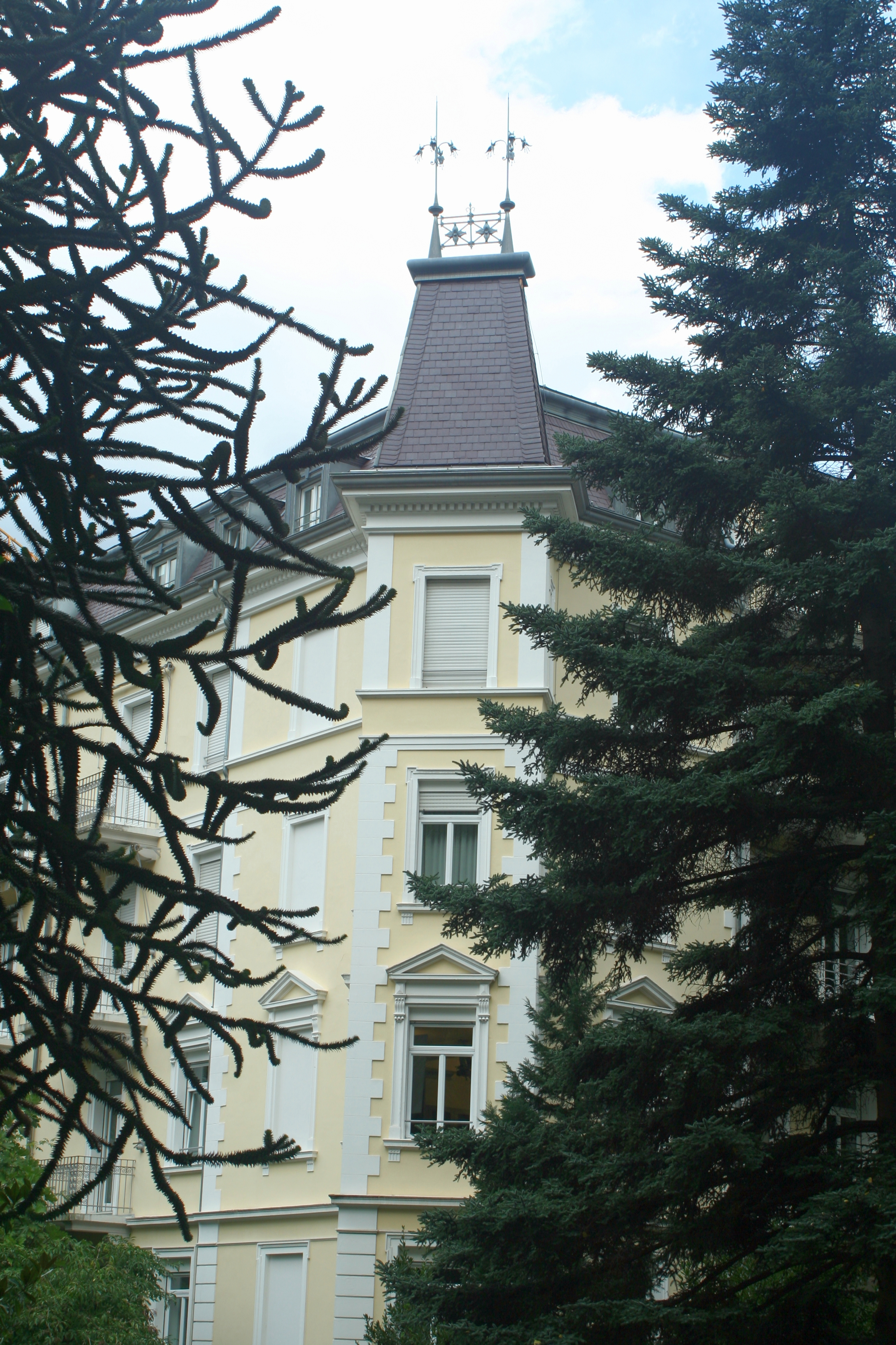 Hotel Savoy, Rätiastraße 1